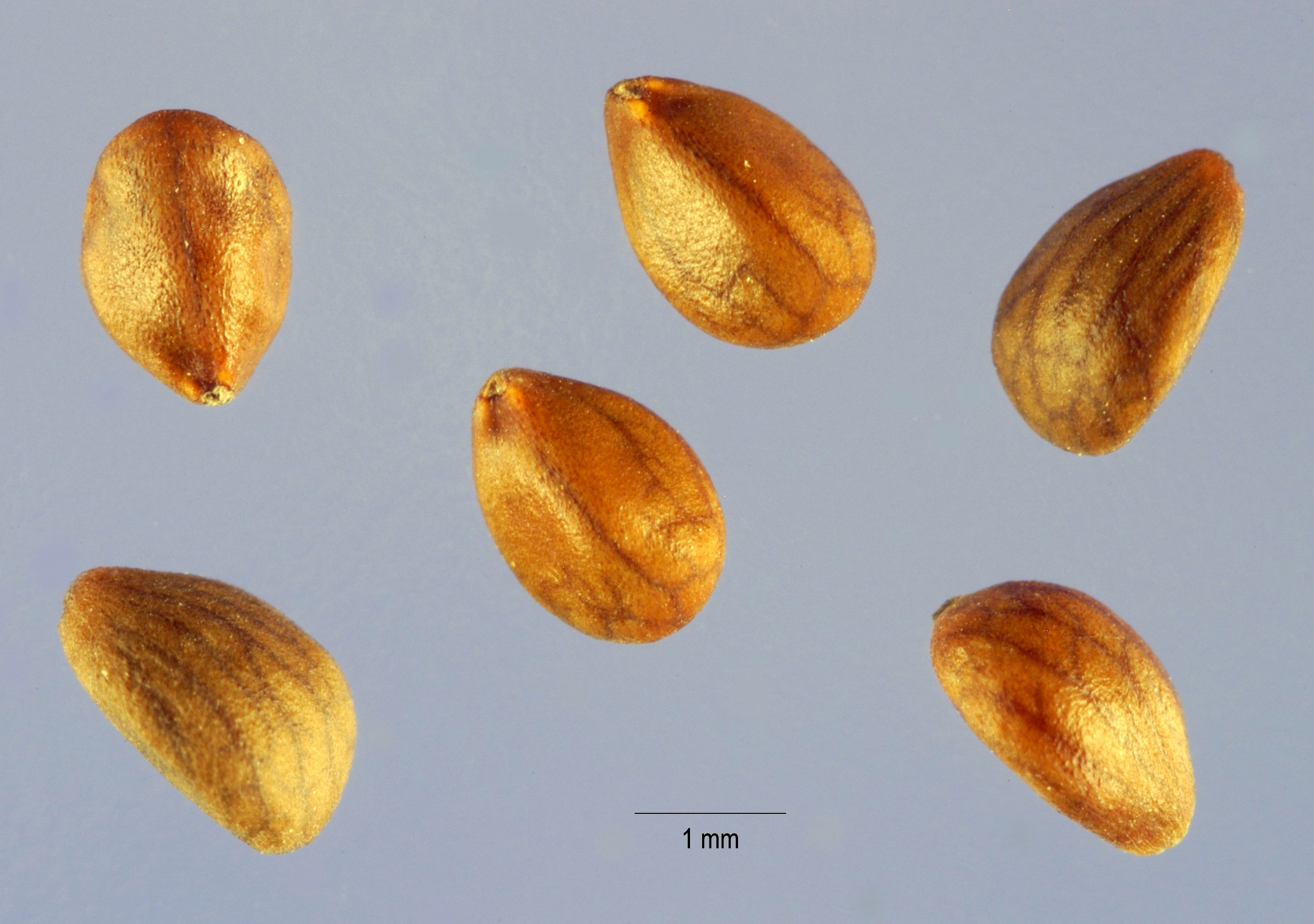 Salvia aethiopis - Núculas sueltas.